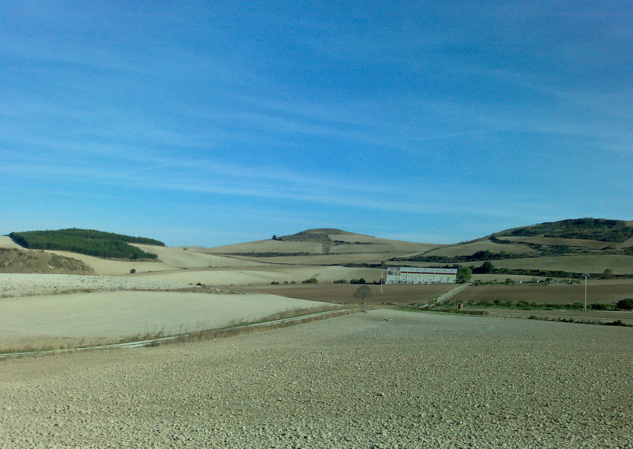 Laborantza lurrak Larraiatik gertu, Zizur Zendean.